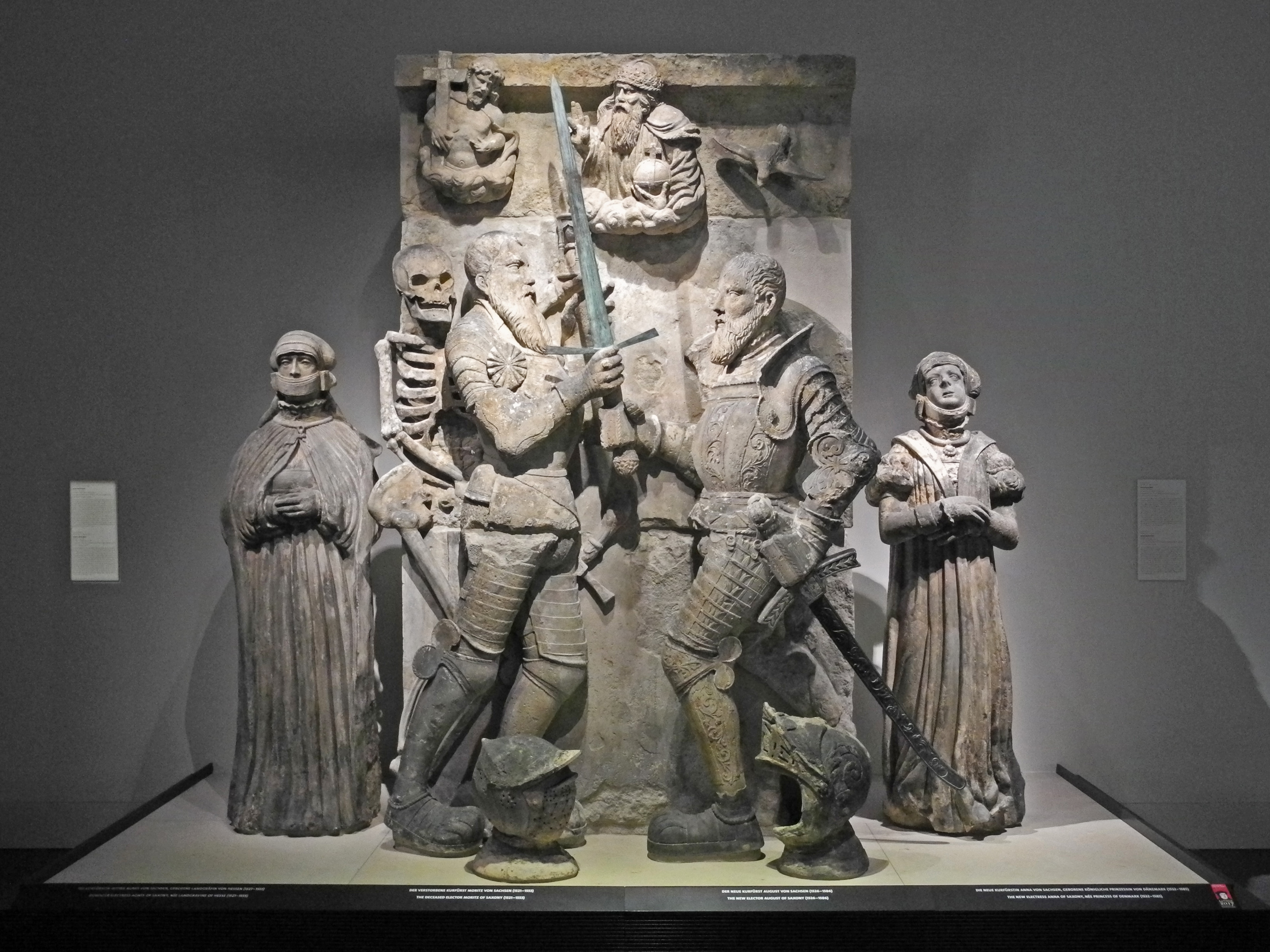 Staatliche Kunstsammlungen Dresden – Original des Moritzmonuments in der Ausstellung „Auf dem Weg zur Kurfürstenmacht“ im Renaissanceflügel des Dresdner Schlosses